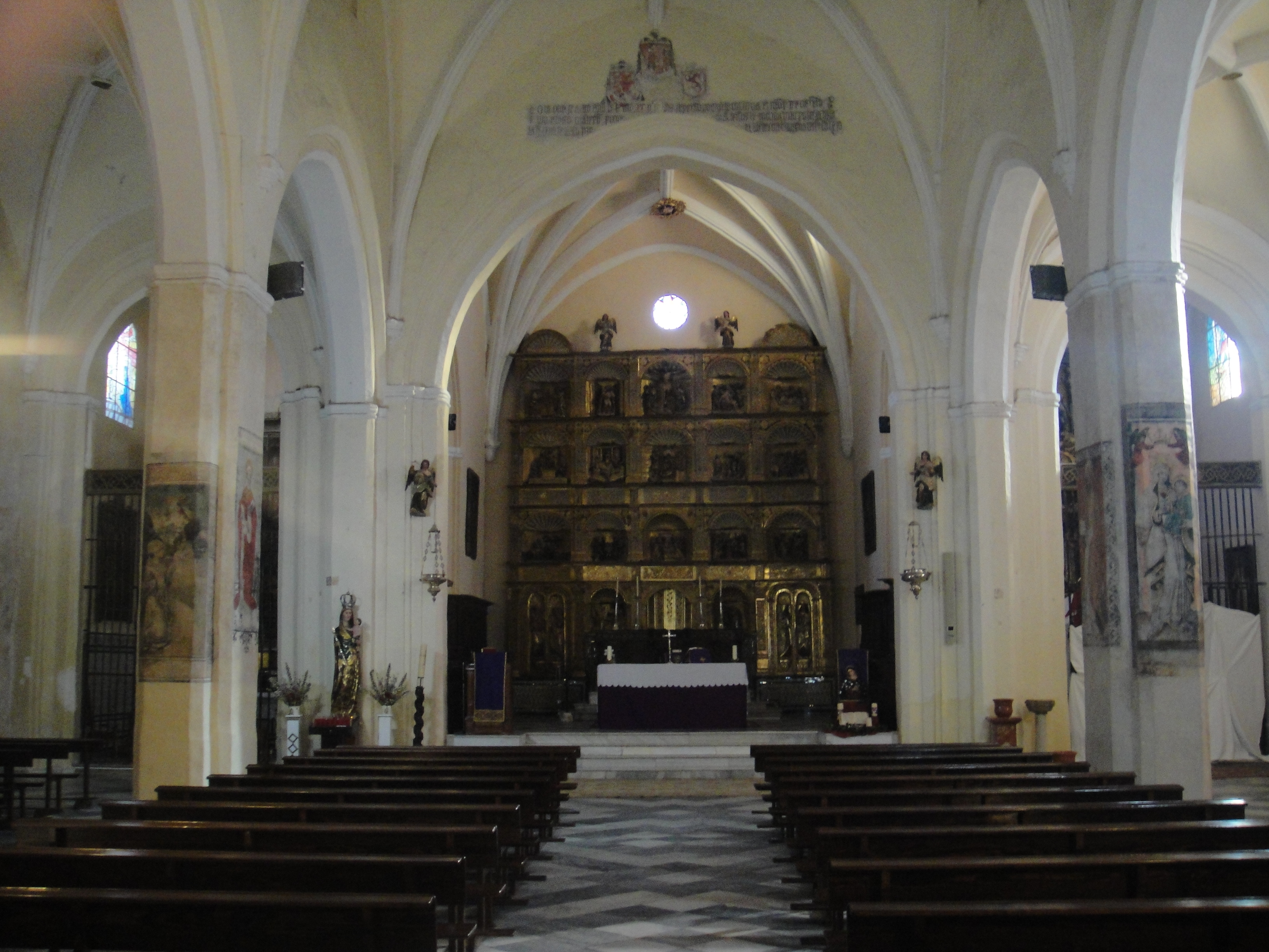 Vista general de la nave y el retablo mayor de la iglesia de Nuestra Señora del Castillo de Fuente Obejuna, provincia de Córdoba, (España).